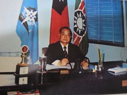 中文（台灣）: 在海專校長時期拍攝！